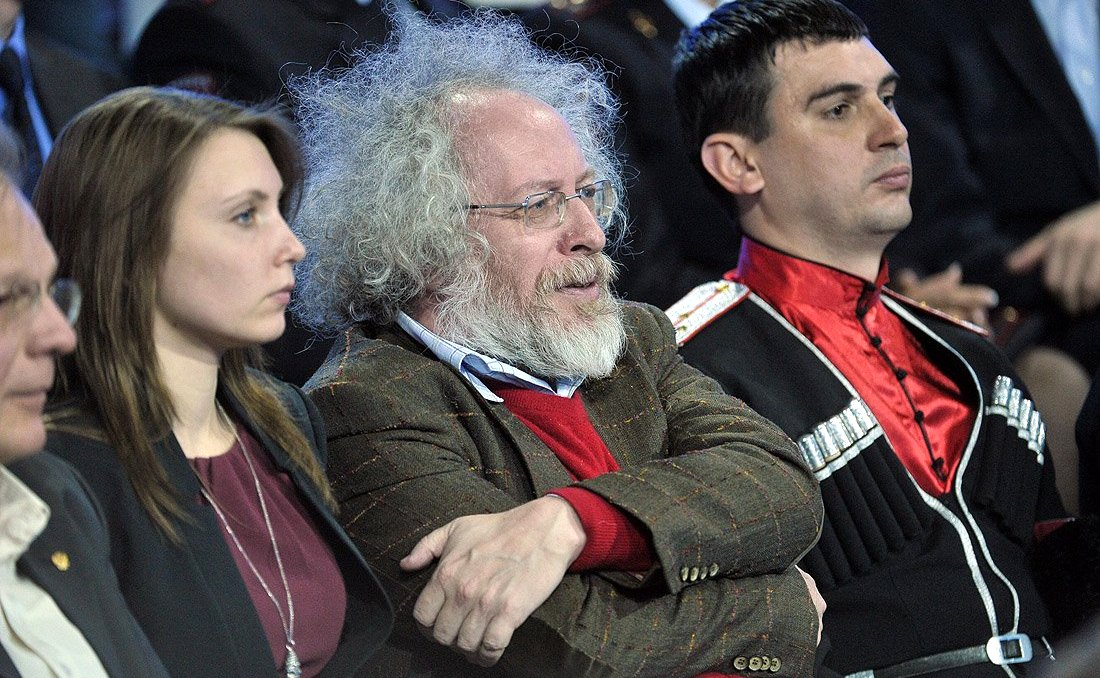 Прямая линия с Владимиром Путиным. Алексей Венедиктов